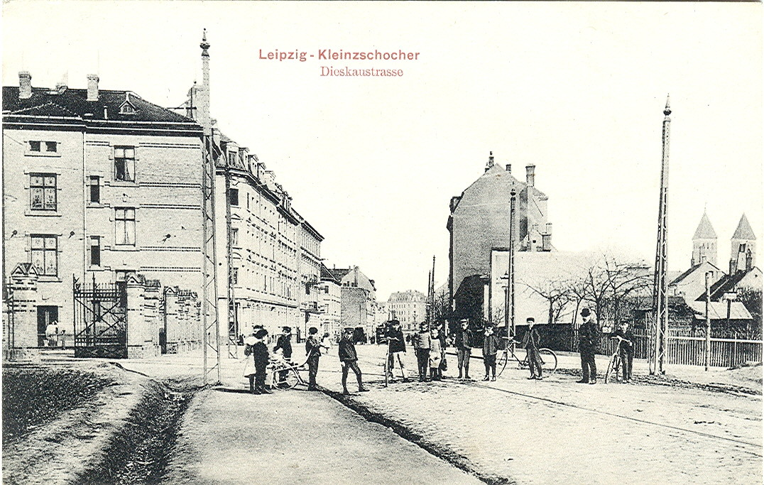 Postcard. ca.1917. Title: "Leipzig - Kleinzschocher. Dieskaustrasse".